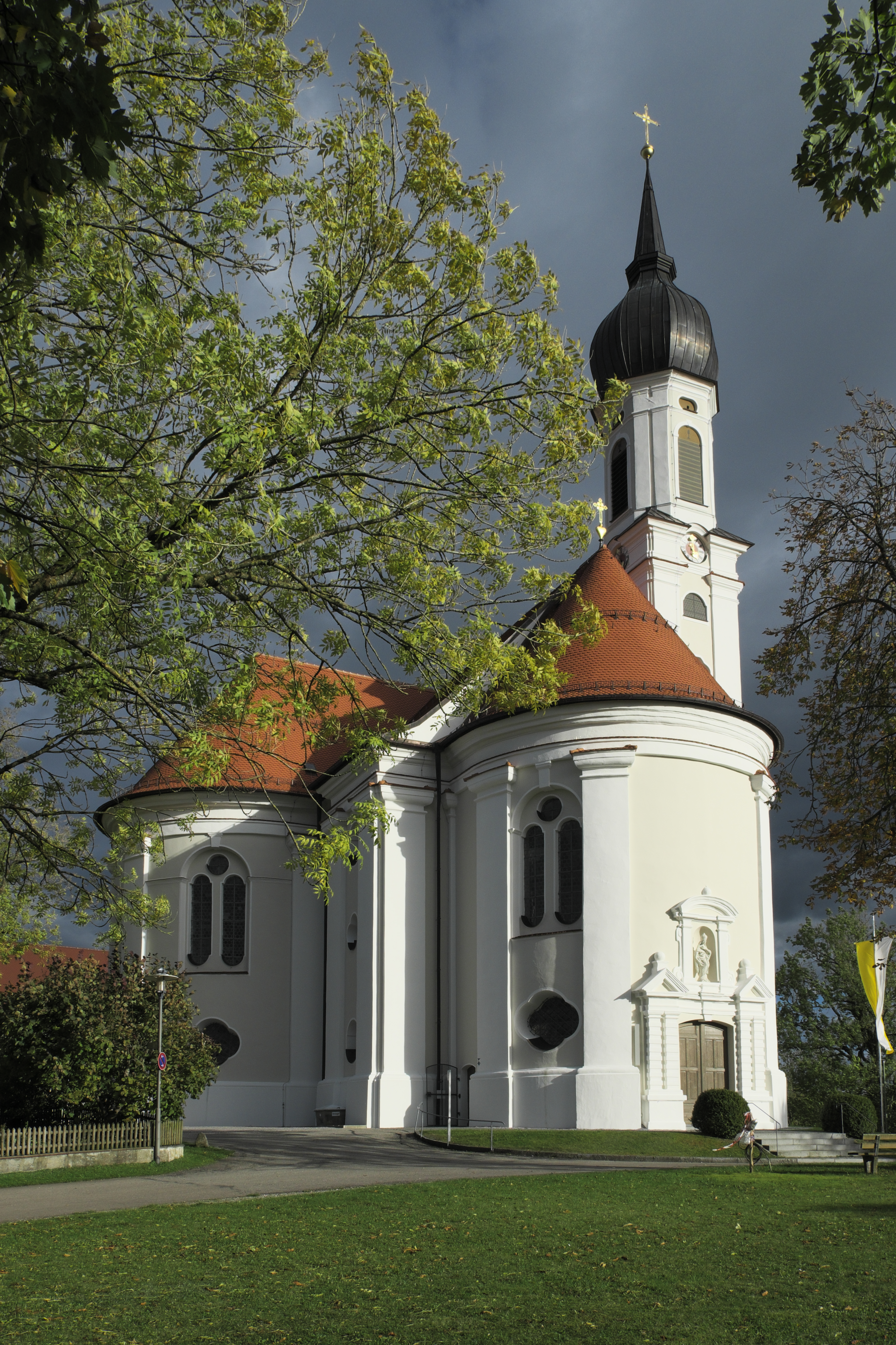 Katholische Wallfahrtskirche Mariä Schmerzen in Vilgertshofen im Landkreis Landsberg am Lech (Bayern/Deutschland)